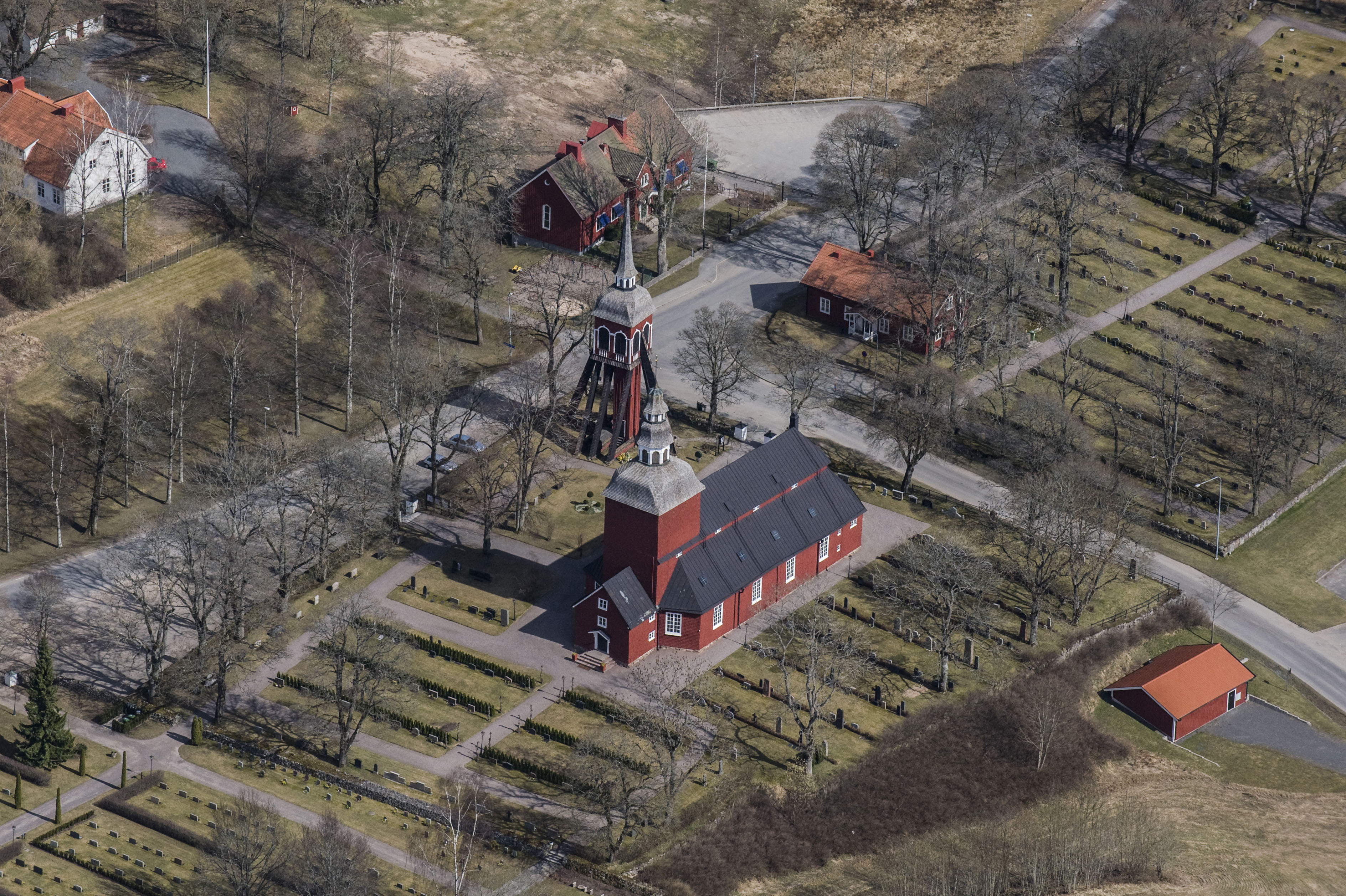 Habo kyrka från luften